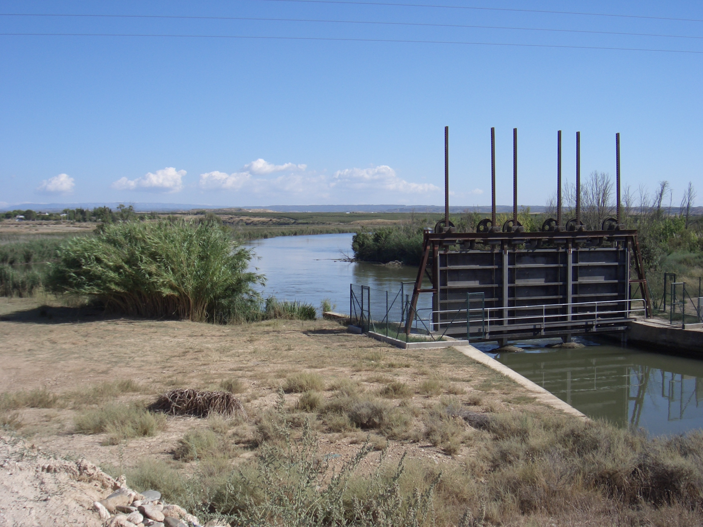 Entrada del Canal de Seròs al embassament d'Utxesa al terme municipal de Torres de Segre. (Catalonia/Spain).